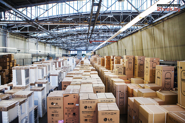 фото склада компании 21vek.by